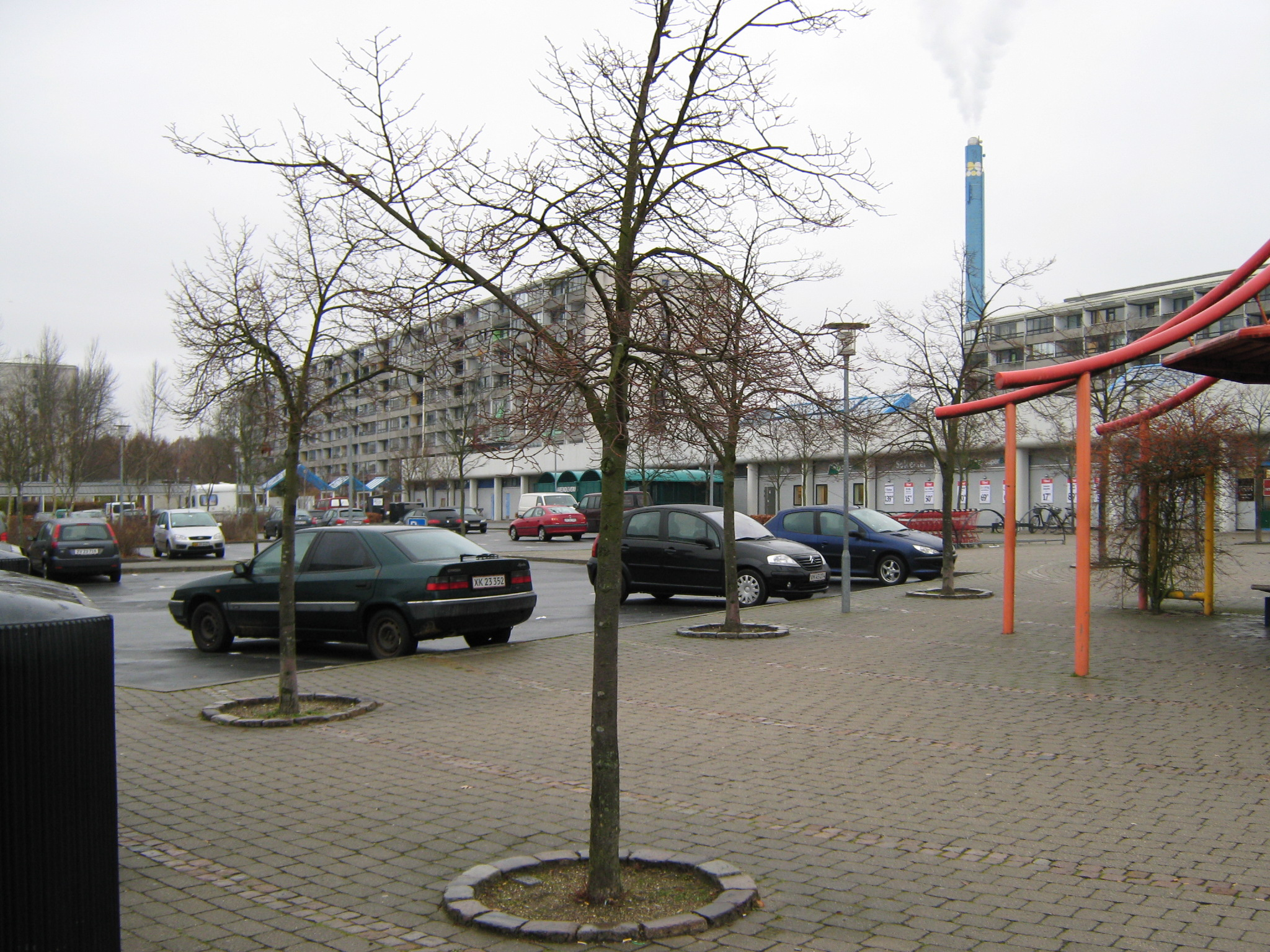 Værebroparken, Bagsværd